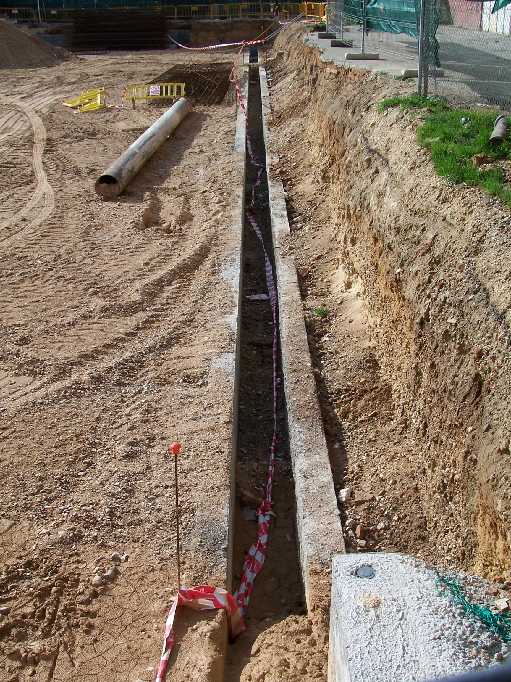 Es una foto con los muros guia de la construcción de los muros pantalla de un aparcamiento. Menudos zarandeos le metían a las armaduras al meterlas luego... Espero que no afecte, menos mal que el hormigón es el mejor material del mundo.